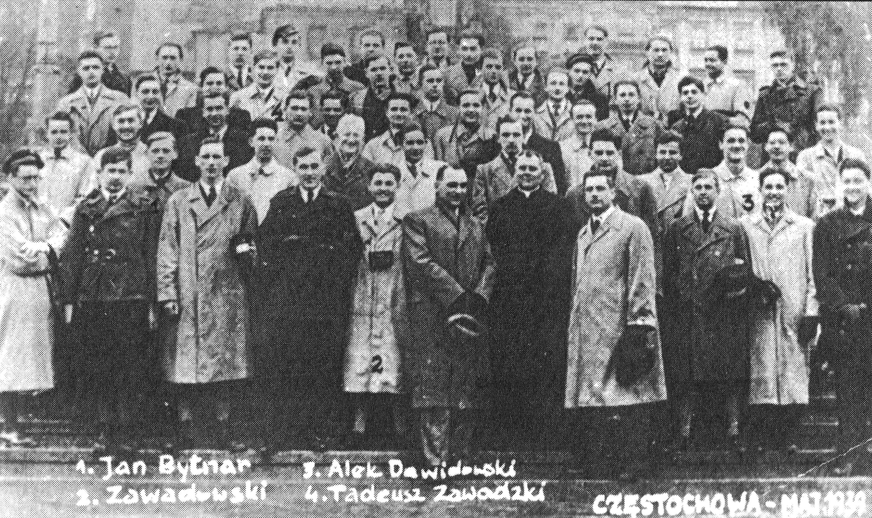 Przedmaturalna pielgrzymka klasy Rudego, Alka i Zośki na Jasną Górę w maju 1939